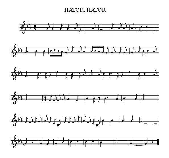 Hator Hator kantaren partitura